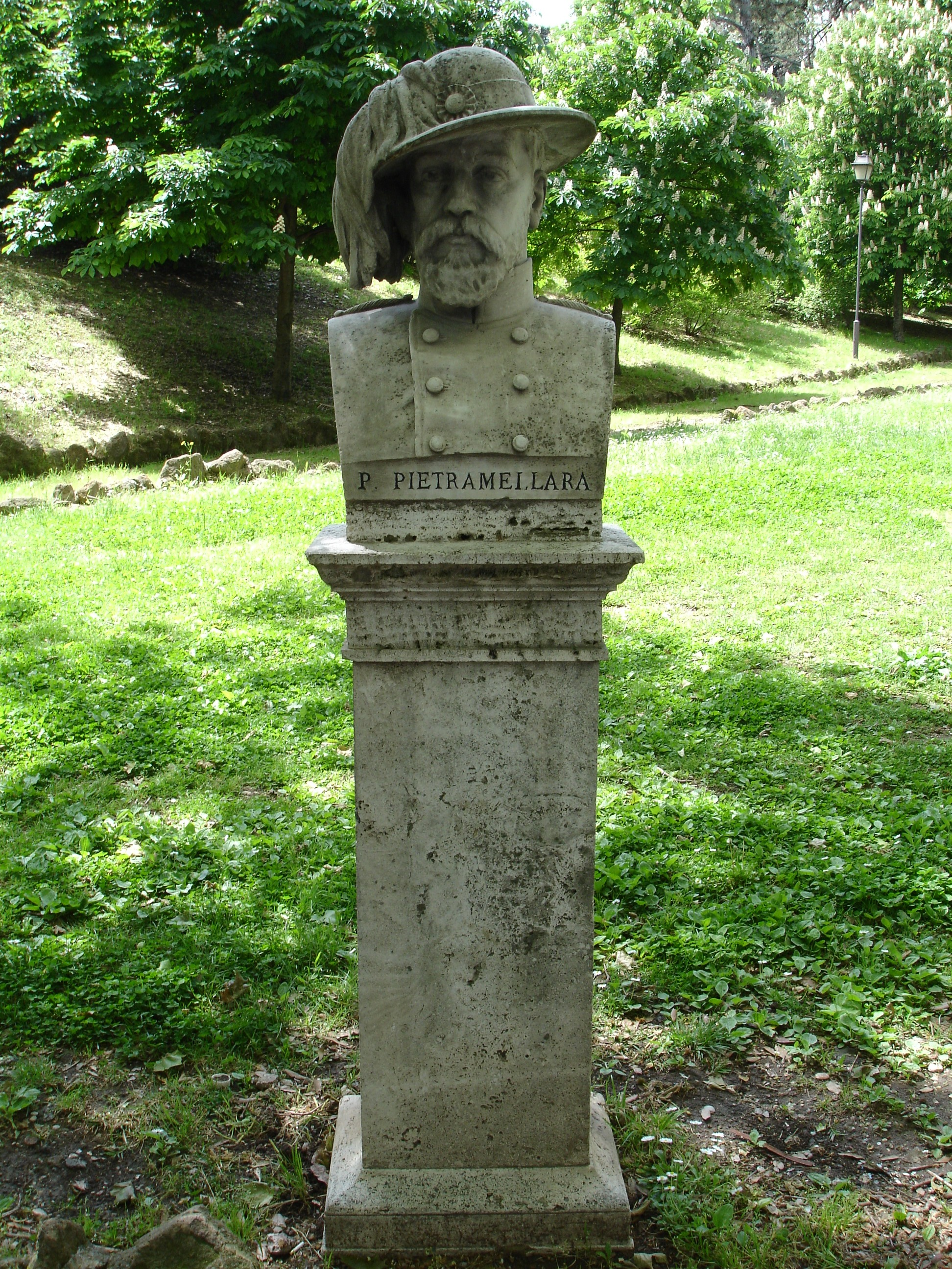 Busto, del 1886, di Pietro Pietramellara (Bologna 1804 - Roma 1849) sul Gianicolo, a Roma. Marchese di orientamento liberale, Pietramellara difese Vicenza nel 1848 e la Seconda Repubblica Romana nel 1849. Foto scattata da F. Fullone. Original uploader was Fullo88 at it.wikipedia.